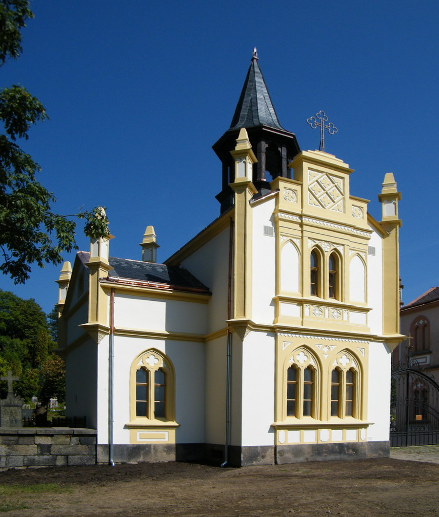 Hřbitovní kostel Nanebevstoupení Páně v Mikulášovicích po rekonstrukci